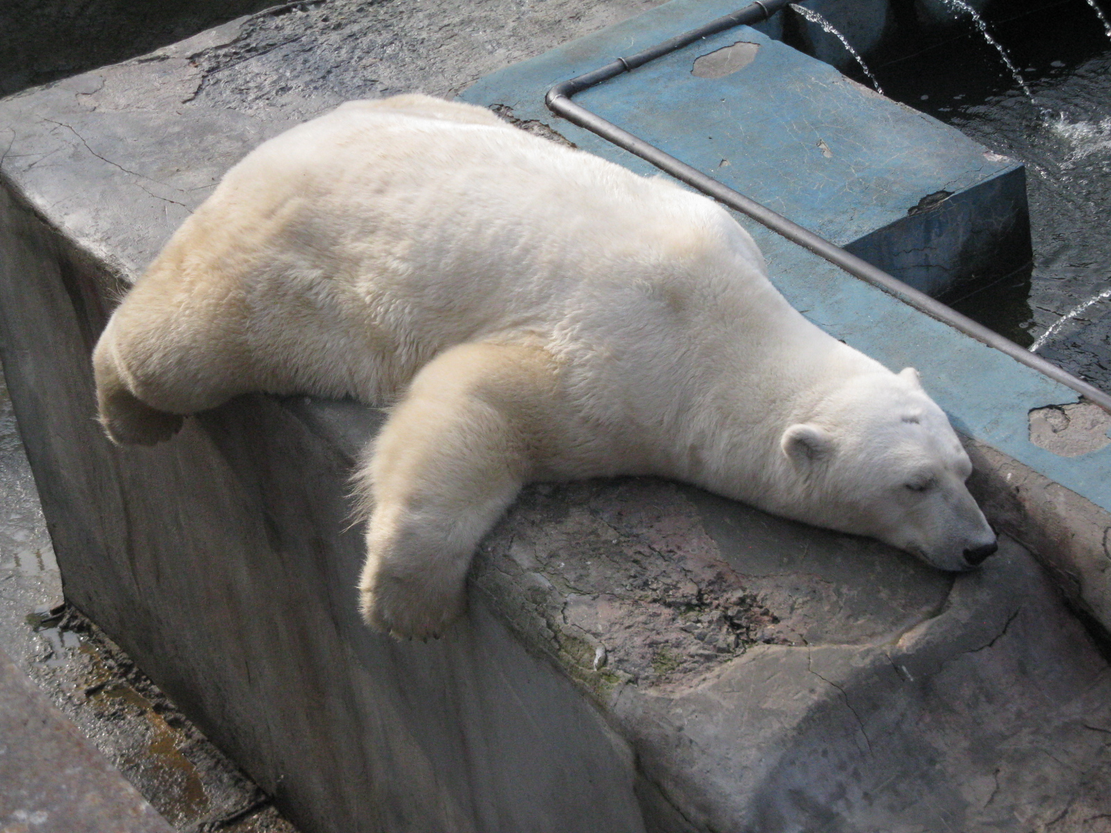 Полярный медведь в Екатеринбургском зоопарке.